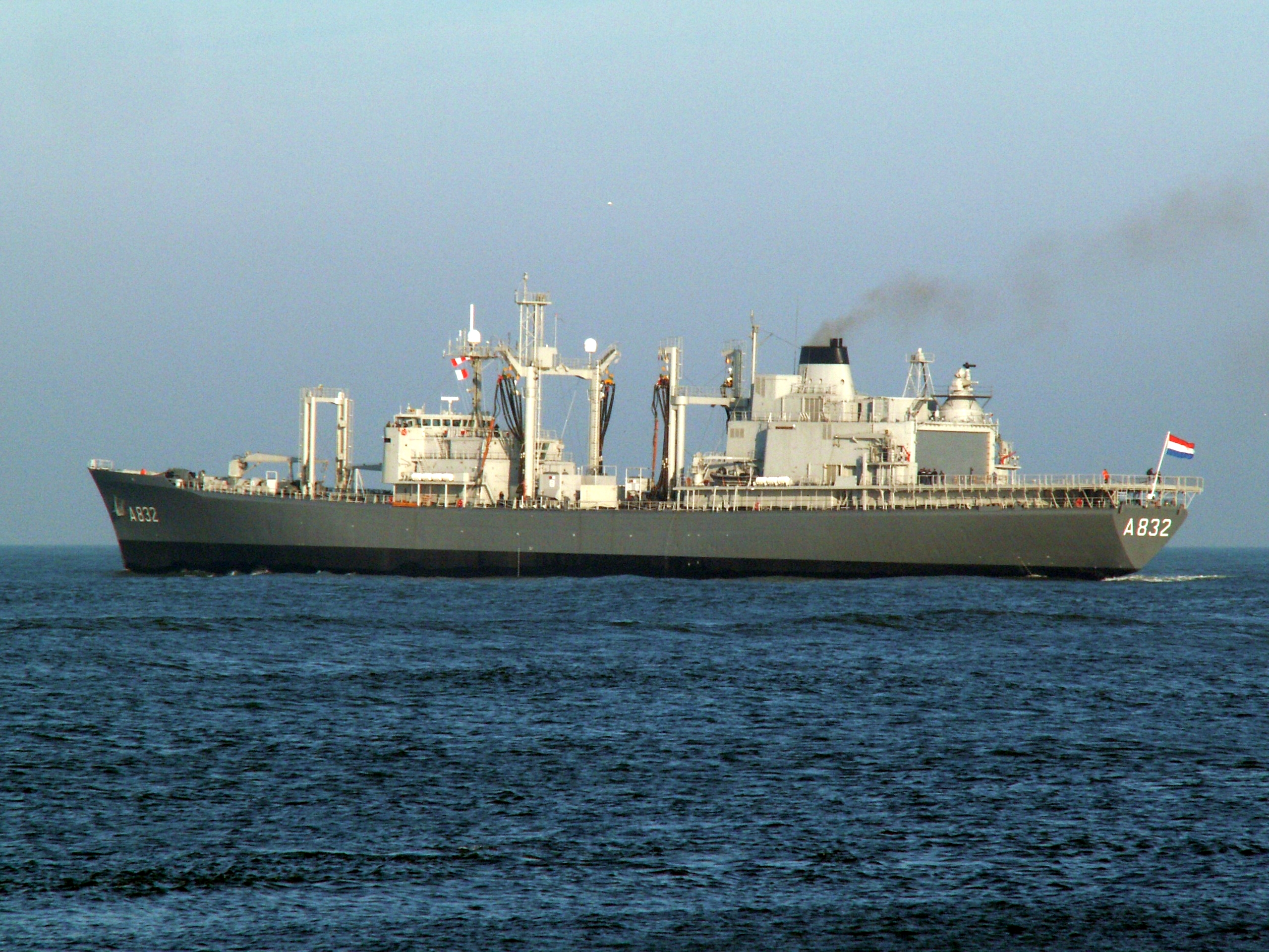 A832 Zuiderkruis at sunset, Port of Rotterdam, Holland.